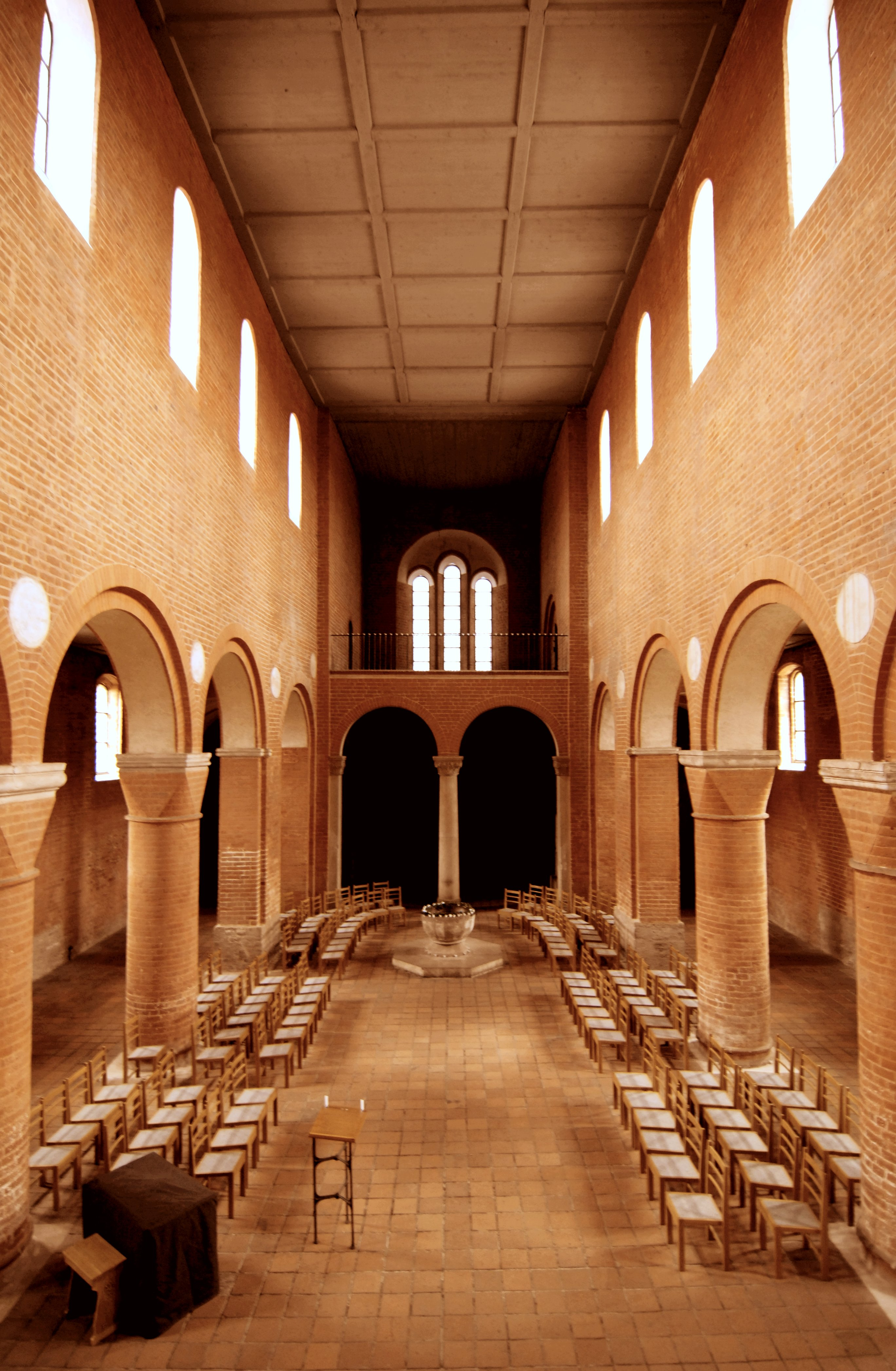 Kloster Jerichow (Brandenburg), Innenraum2